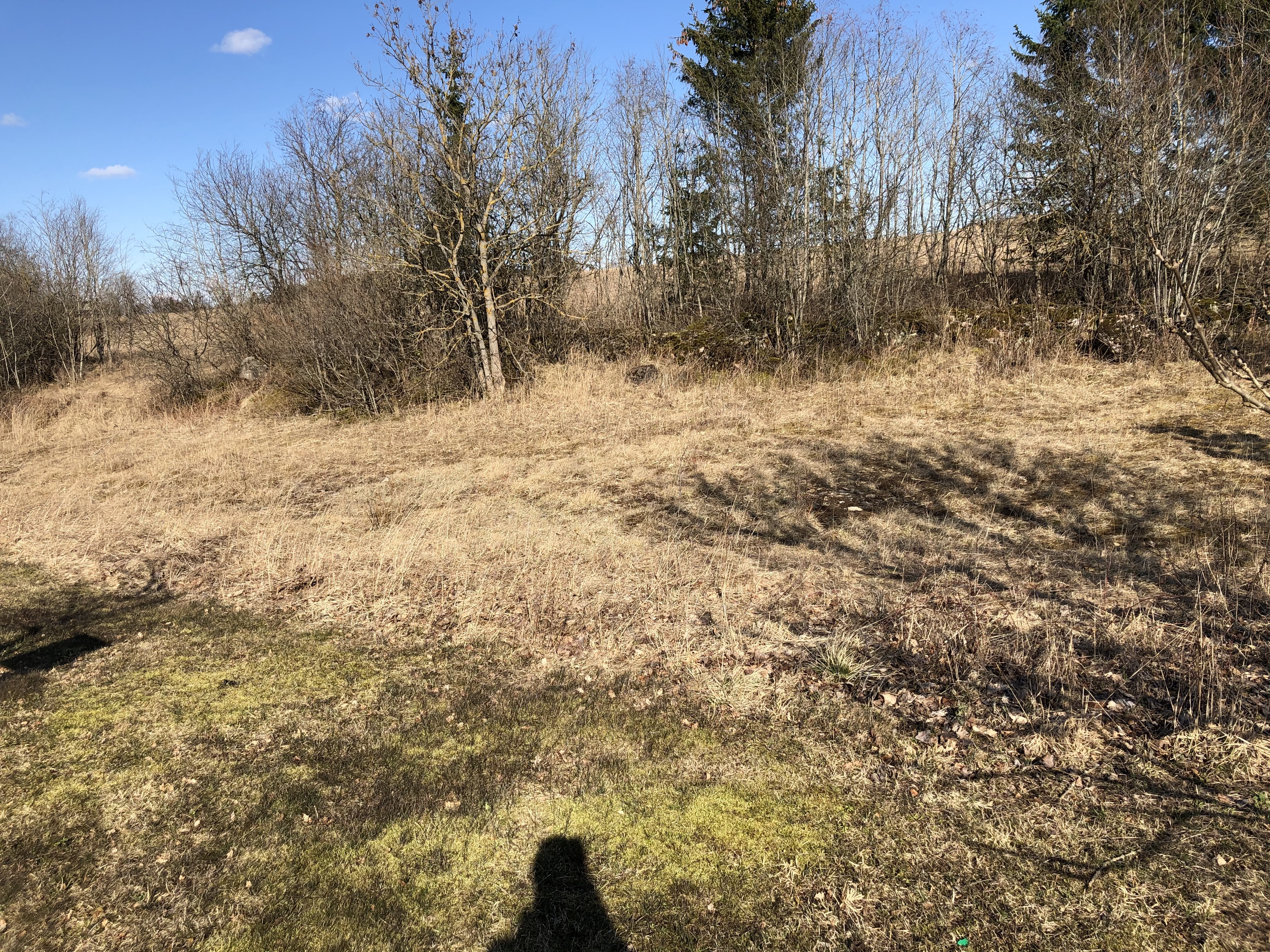 Jõeorg